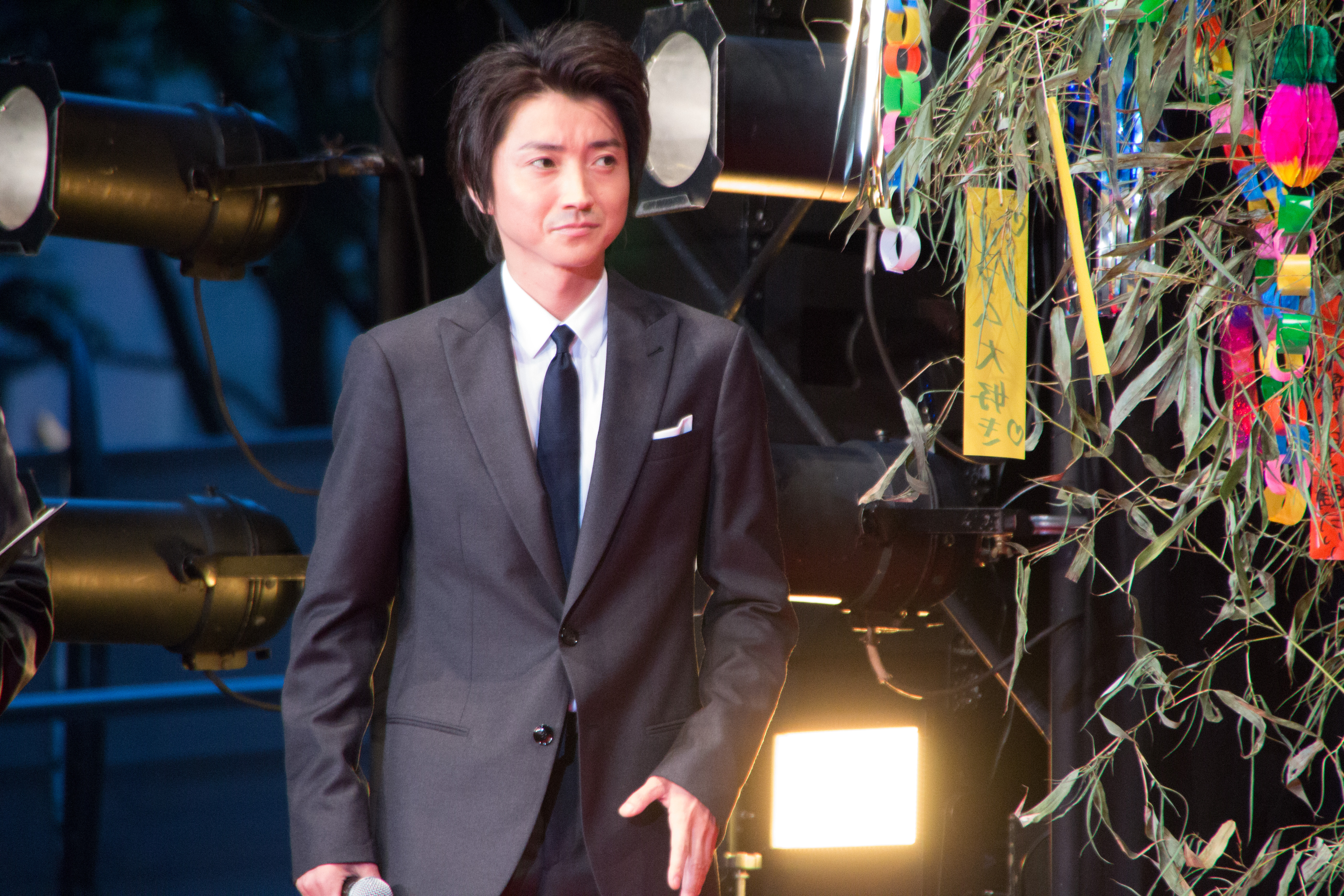 インデペンデンス・デイ: リサージェンス ジャパンプレミア 藤原竜也